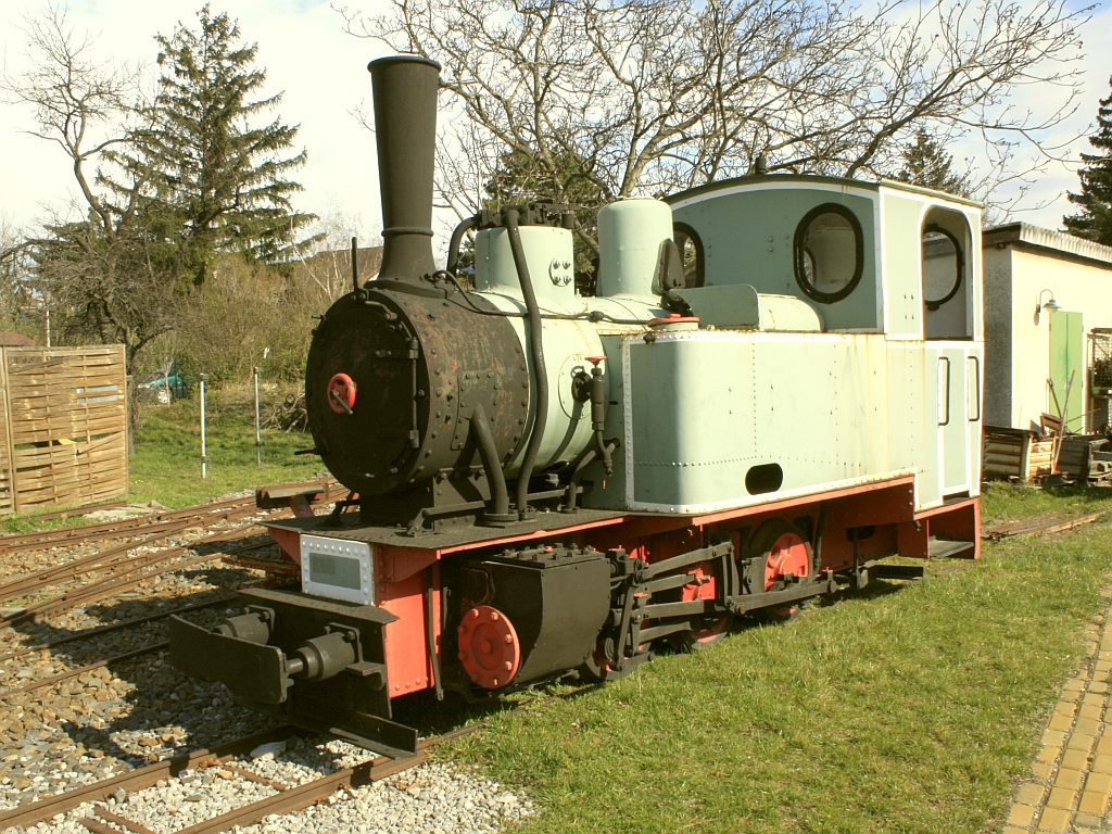 RIIIc418 im Eisenbahnmuseum Schwechat